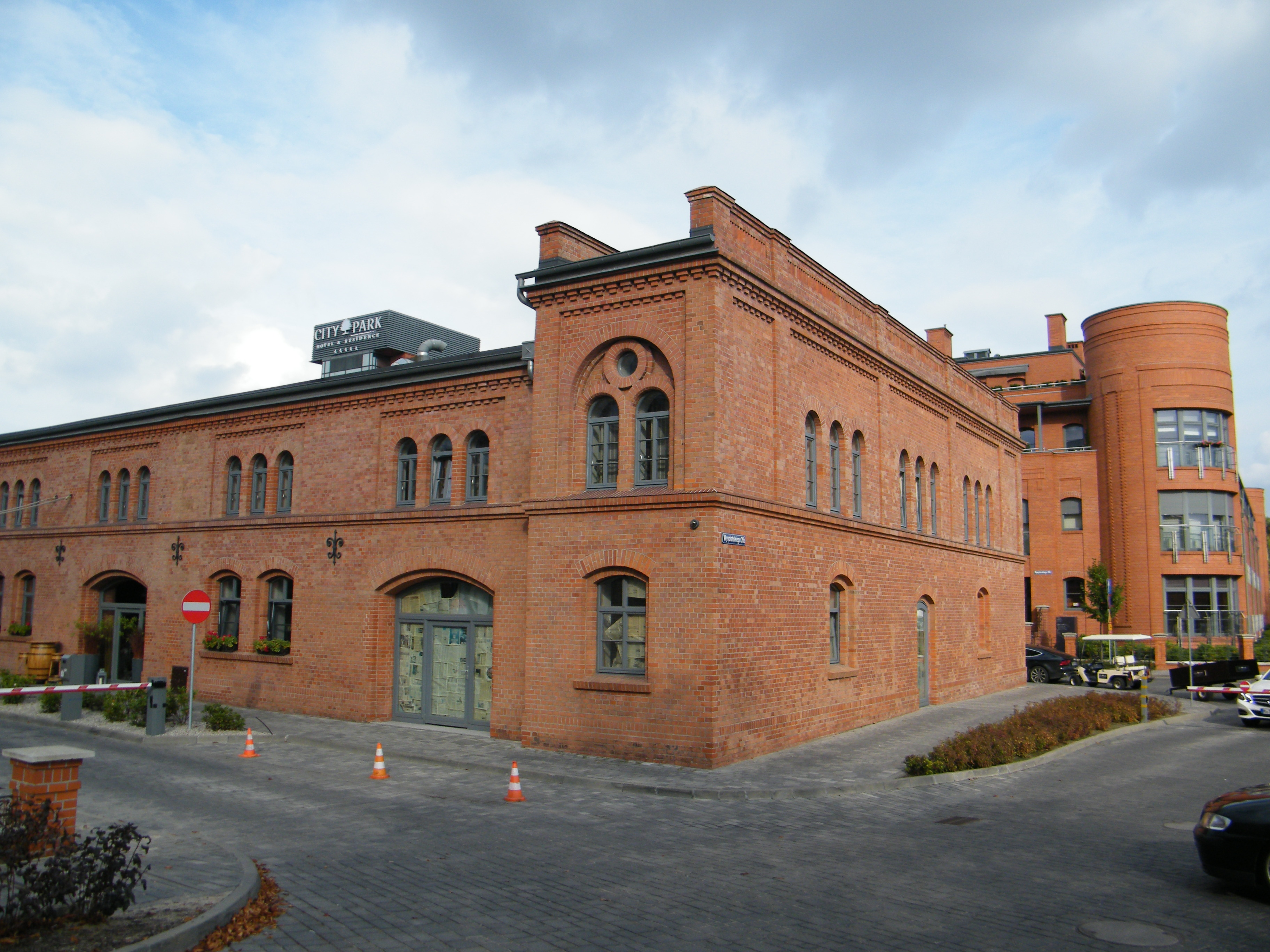 Poznań, koszary Dolnośląskiego Batalionu Taborowego nr 5, 1890-96